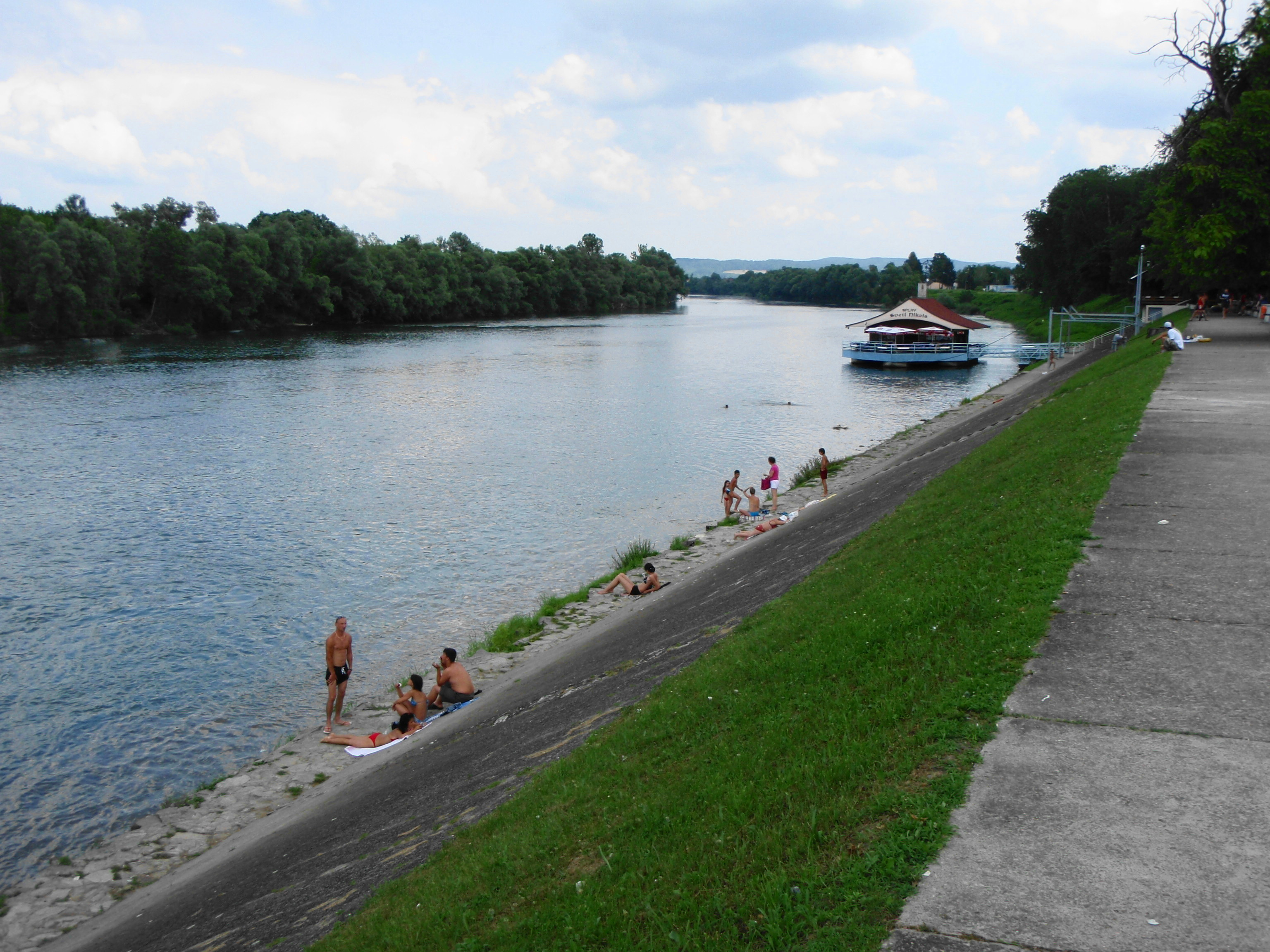 Козарска Дубуца, плажа на Уни.